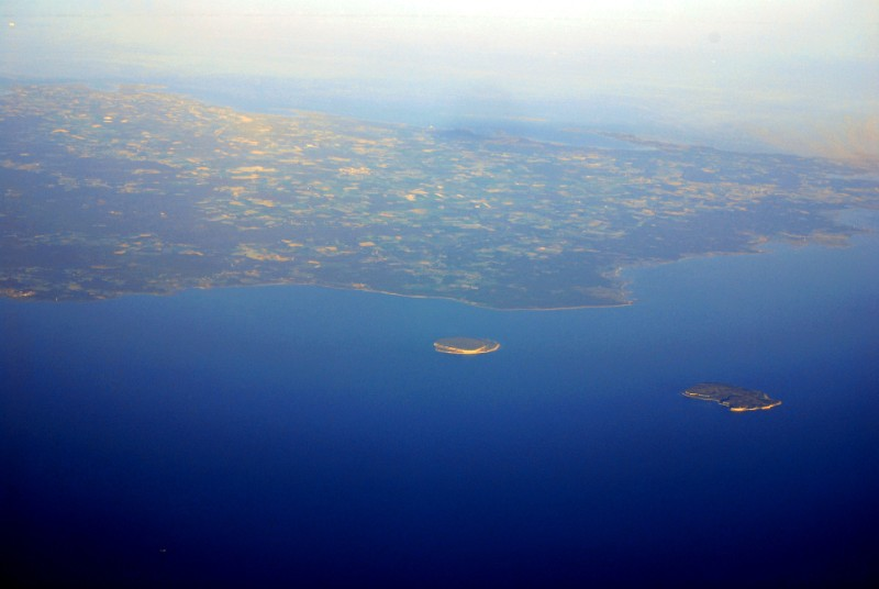 Karlsö Islands (Stora Karlsö (right small island) and Lilla Karlsö (left small island)) and Gotland.